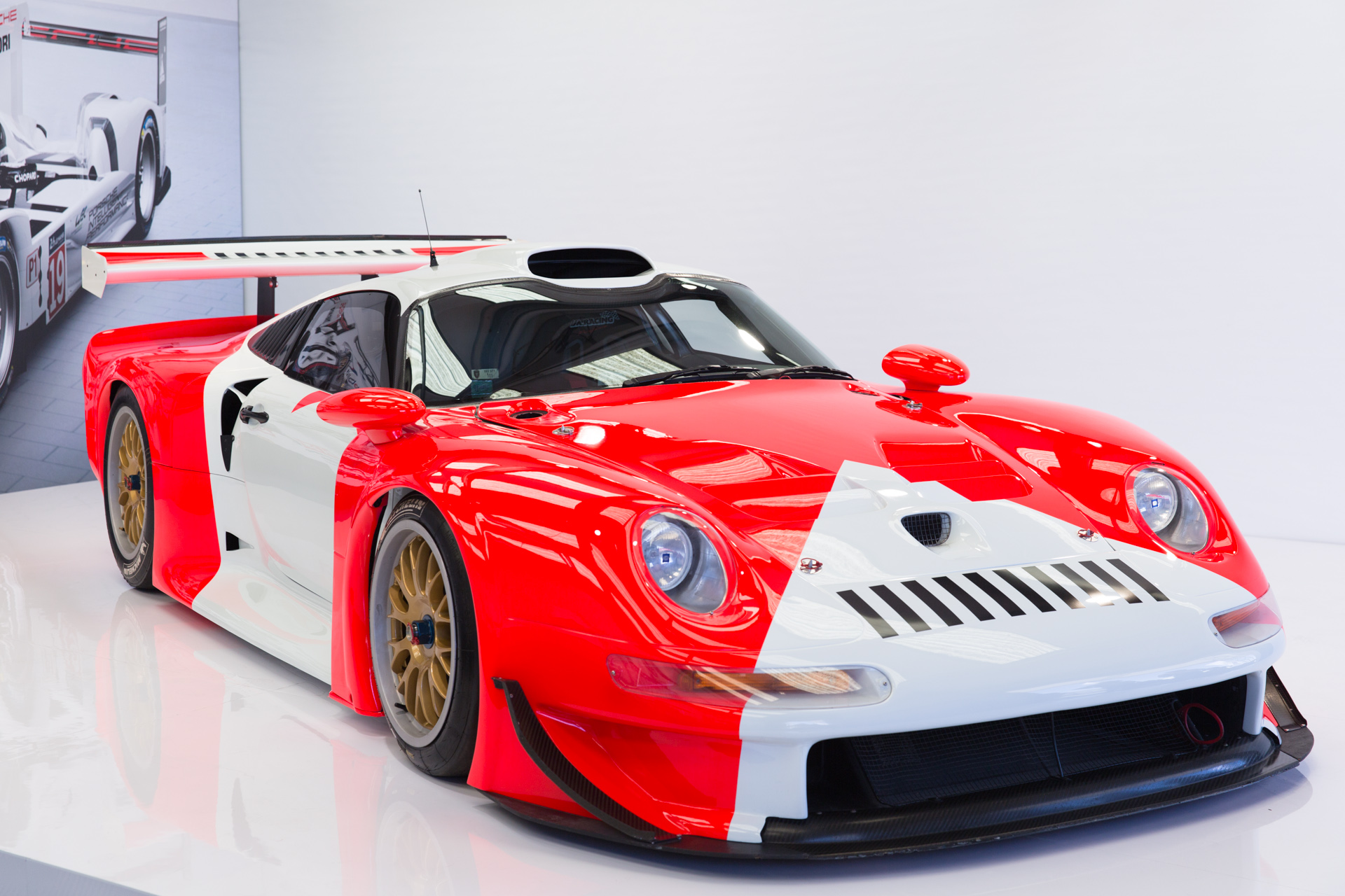 Rennsport Reunion V